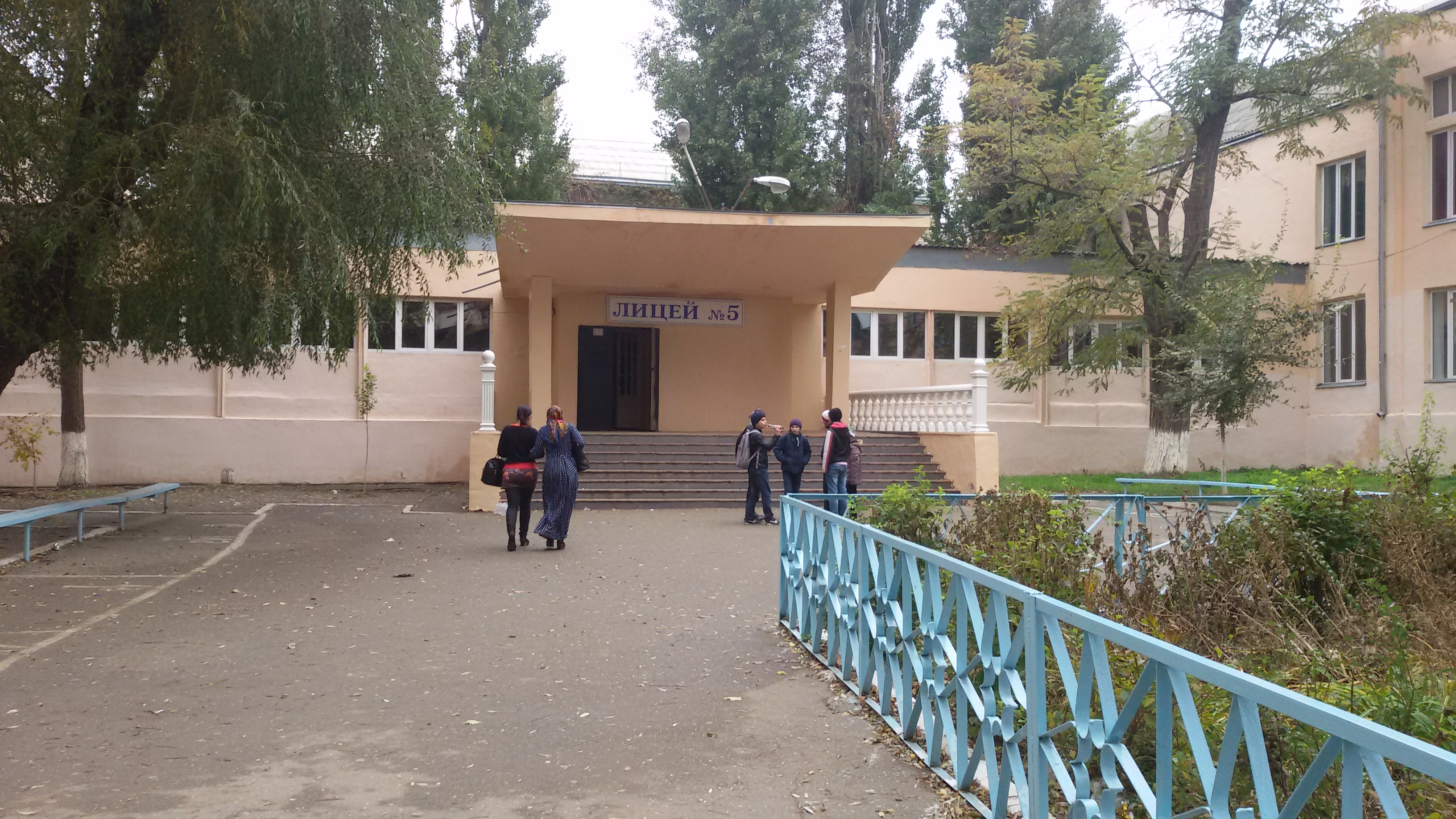 Здание средней школы N5, где размещался эвакогоспиталь 4651 (Республика Дагестан, Махачкала, 26 Бакинских комисаров улица, 78)